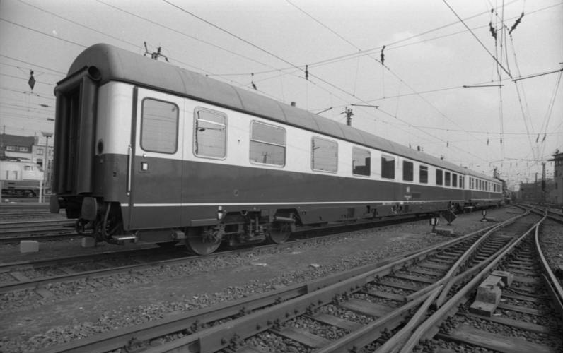 Salon-Zug der Deutschen Bundesbahn (für geplanten DDR-Besuch von Bundeskanzler Helmut Schmidt) [Bundesbahnsonderwagen, alt + neu, in Köln]